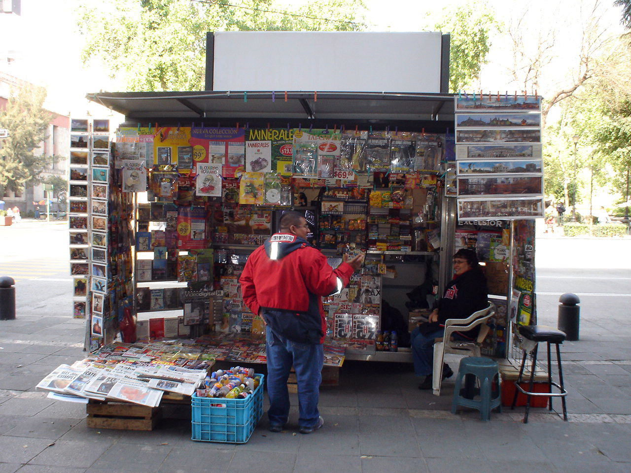 PUESTO DE PERIODICOS EN EL DISTRITO FEDERAL